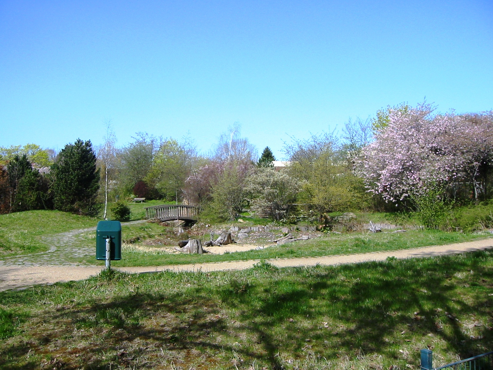 Oberlandpark in Berlin-Tempelhof (Blick vom Nackenheimer Weg)